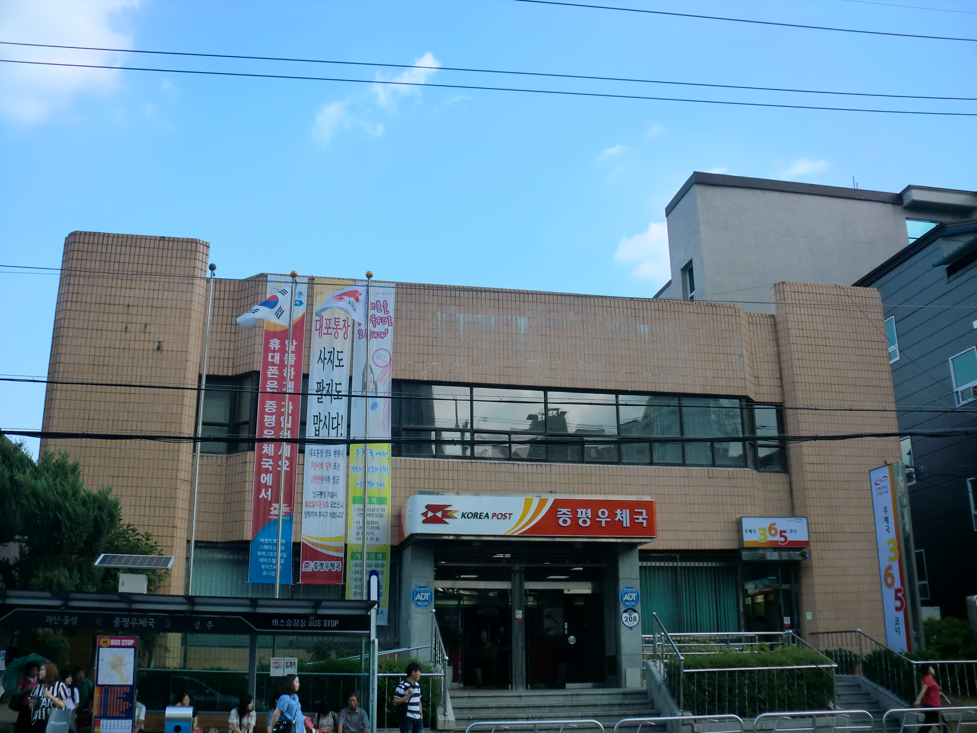 충청북도 증평군에 있는 증평우체국